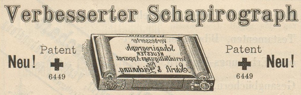 Schapyrograph